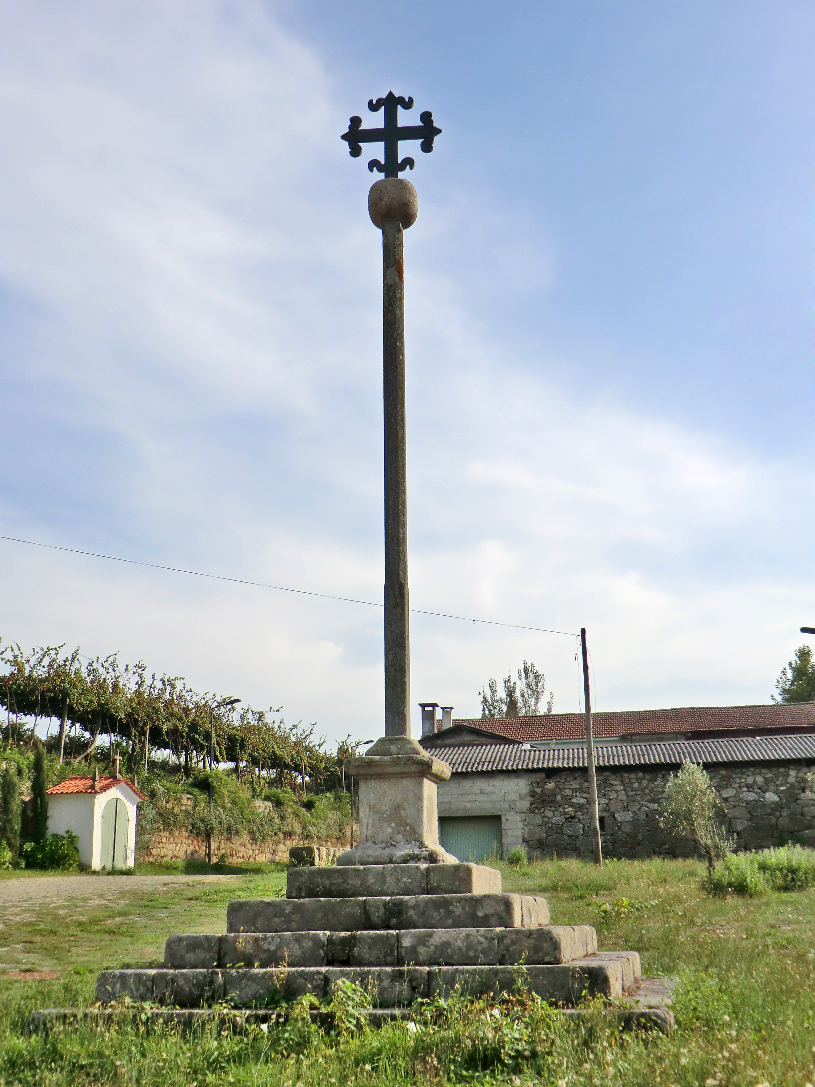 Cruzeiro (Felgueiras) situado no largo em frente do cemitério This file was uploaded for Wiki Loves Monuments in Portugal with the unique identifier 74213.